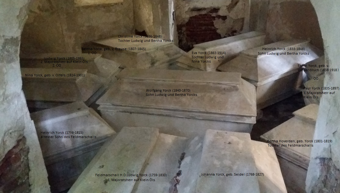 Gruft des Mausoleums der Grafen Yorck von Wartenburg auf Klein Oels